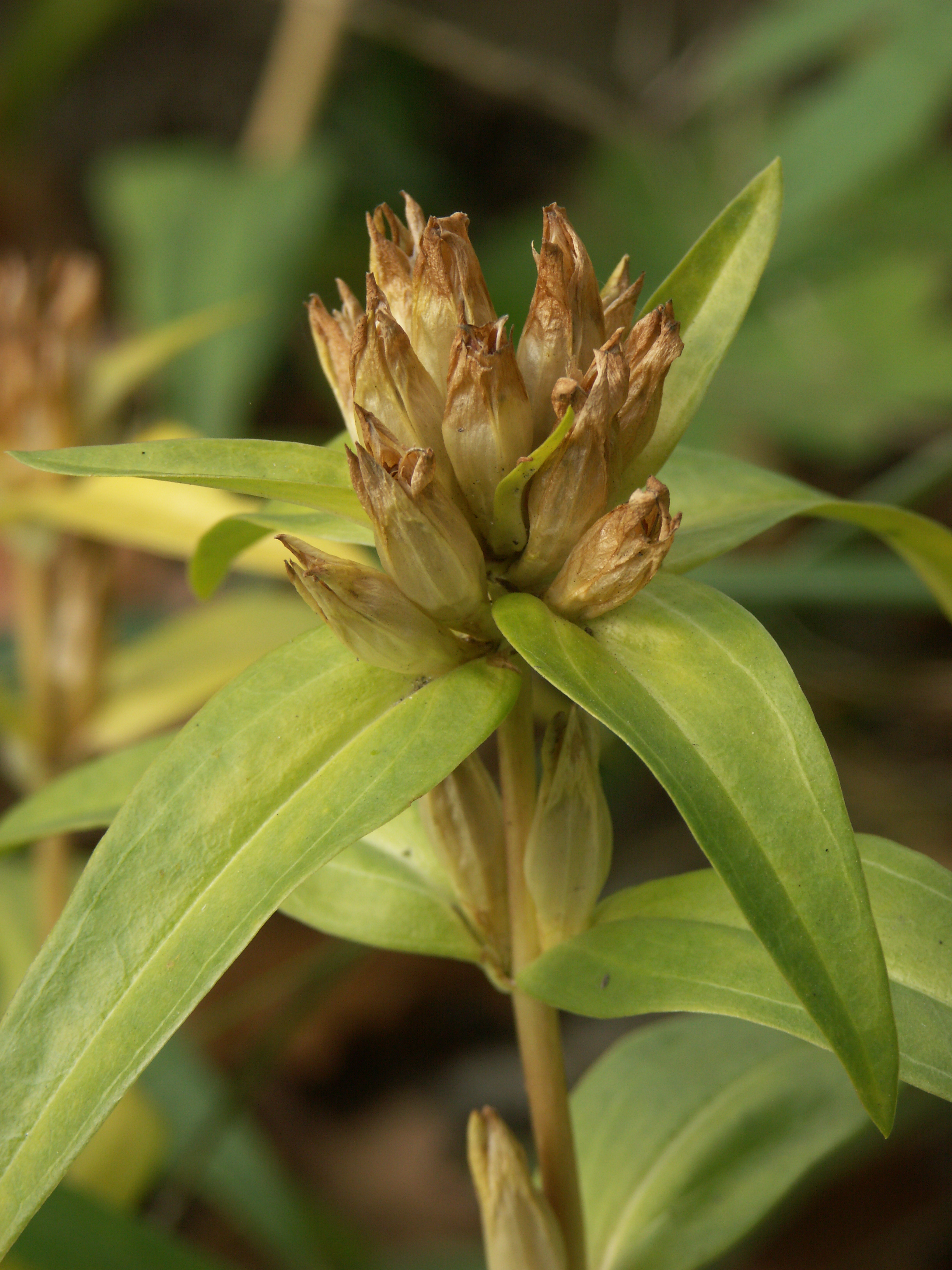 Fruchtstand des Kreuz-Enzians (Gentiana cruciata)